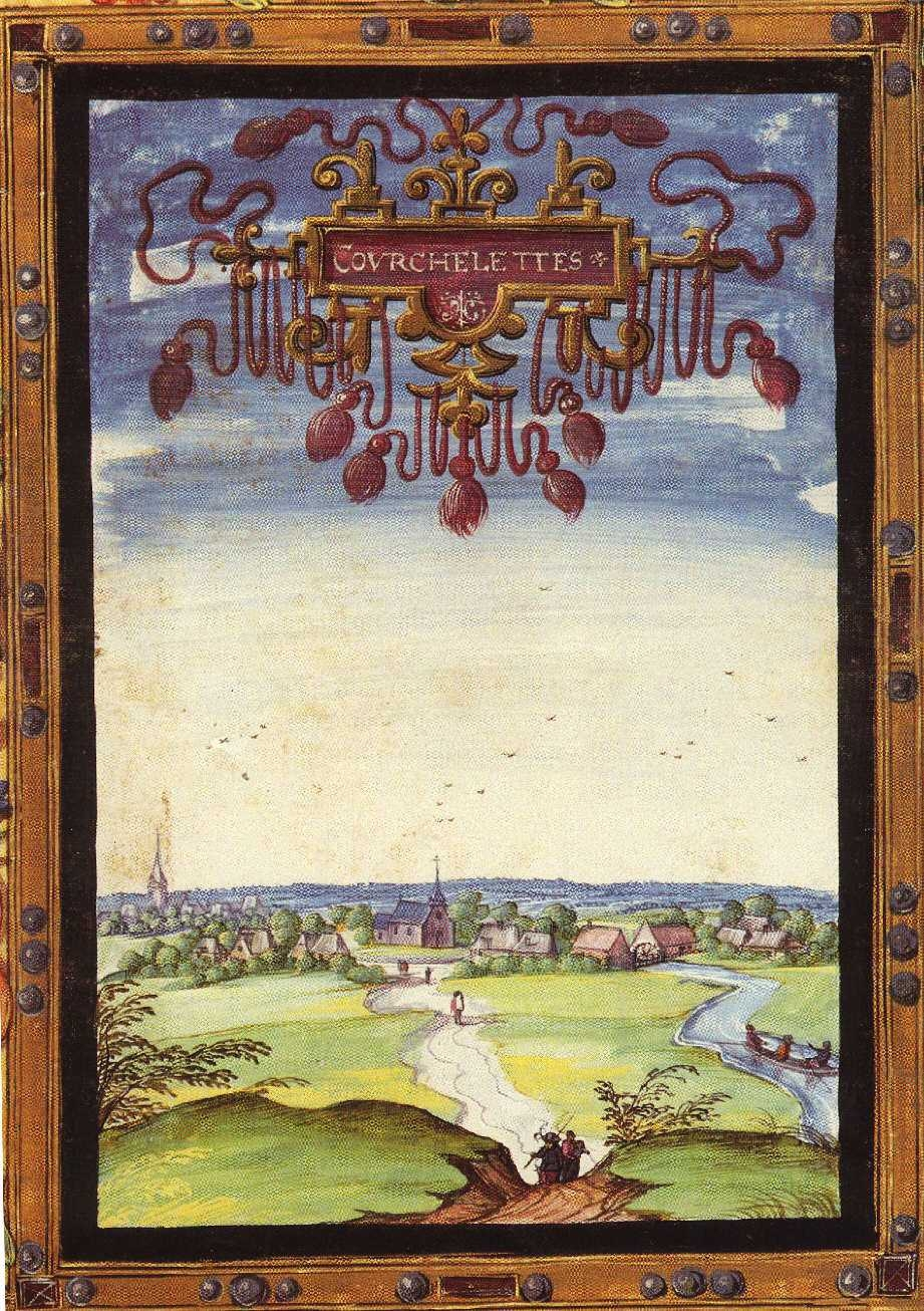 Courchelettes au XVIe siècle Cartulaire de l'Album de Croÿ dessiné par Adrien de Montigny